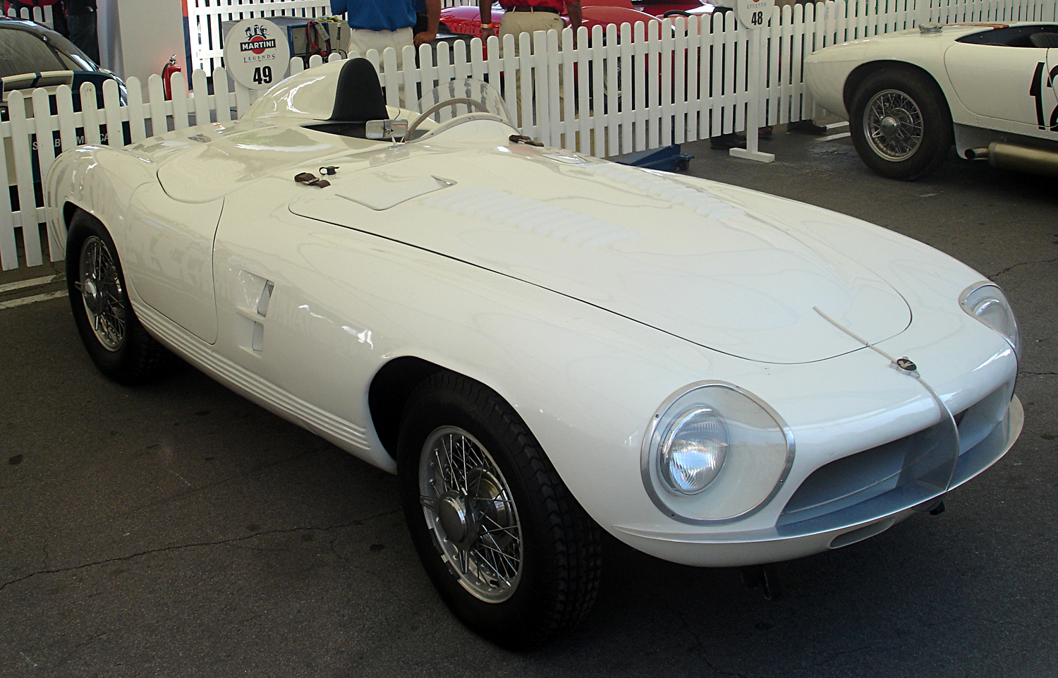 Pegaso Barqueta Pedralbes, exposat al festival Martini Legends (commemoració del 75 aniversari del Circuit de Montjuïc)